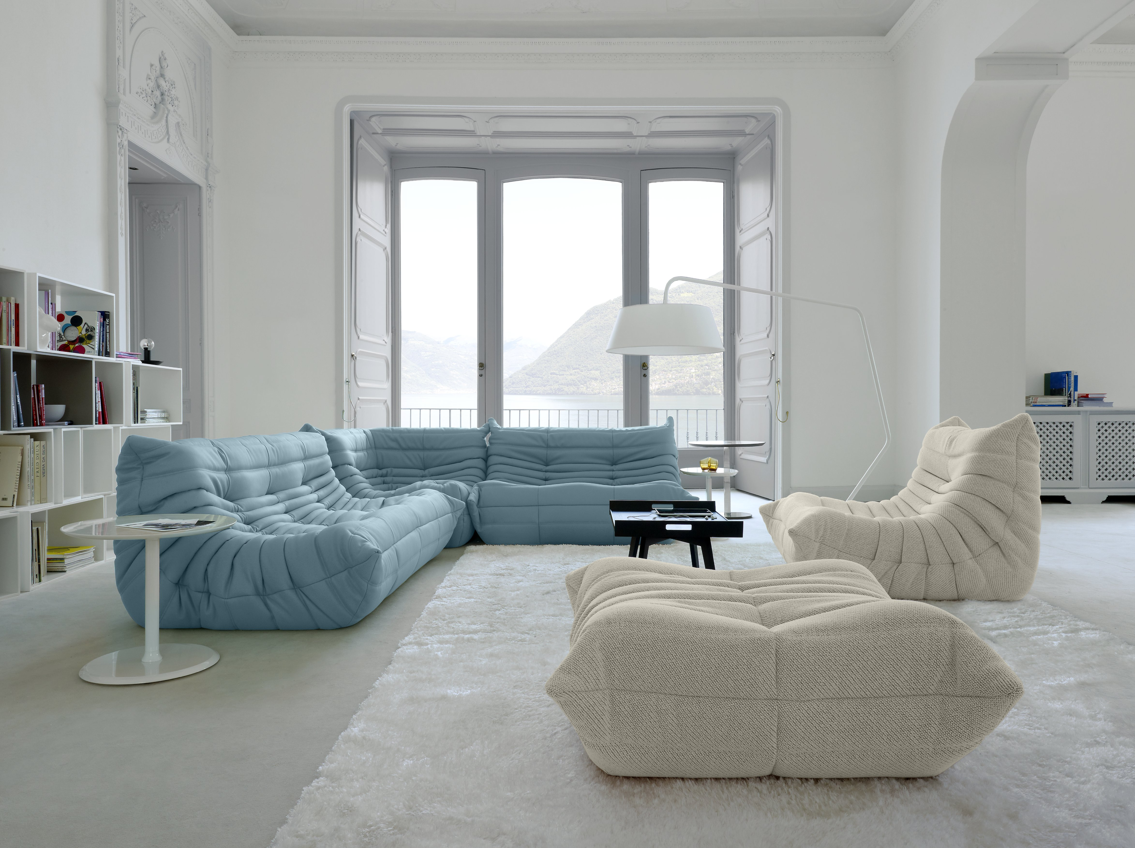 Sofa und Hocker